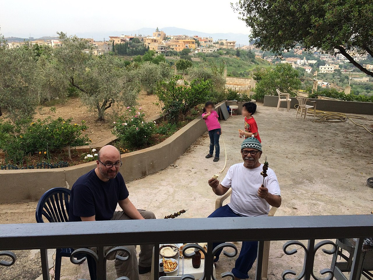 يوم جميل مع اب وابن واحفاد في قرية النميرية